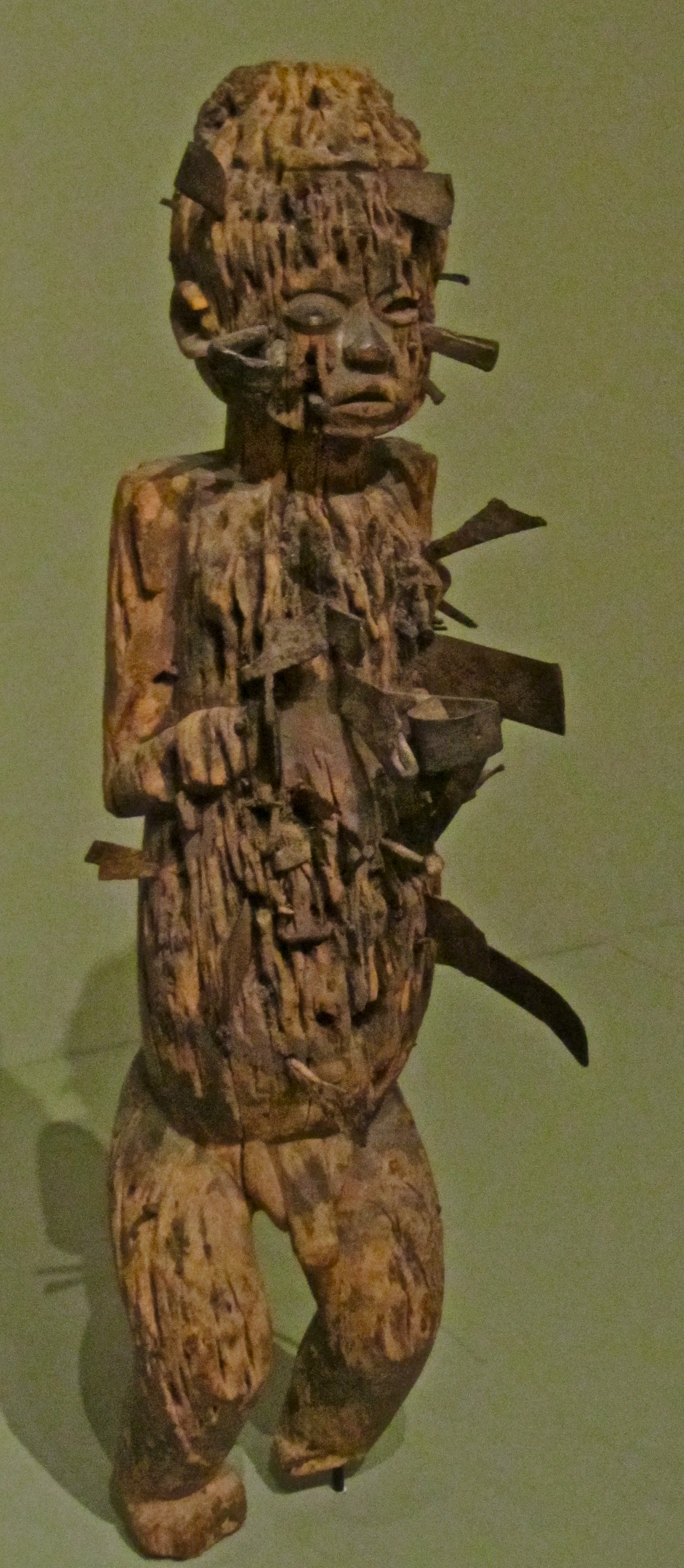 Male figure, Bwende people